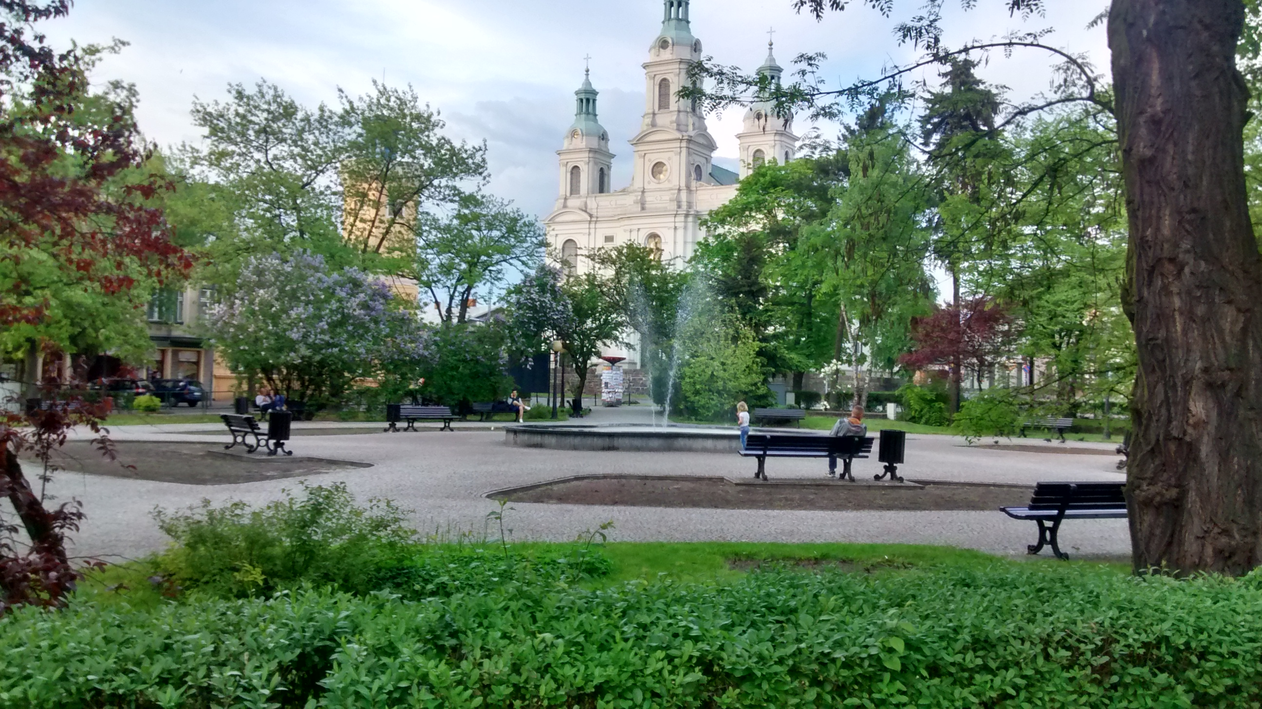 Dworzec autobusowy Haymarket